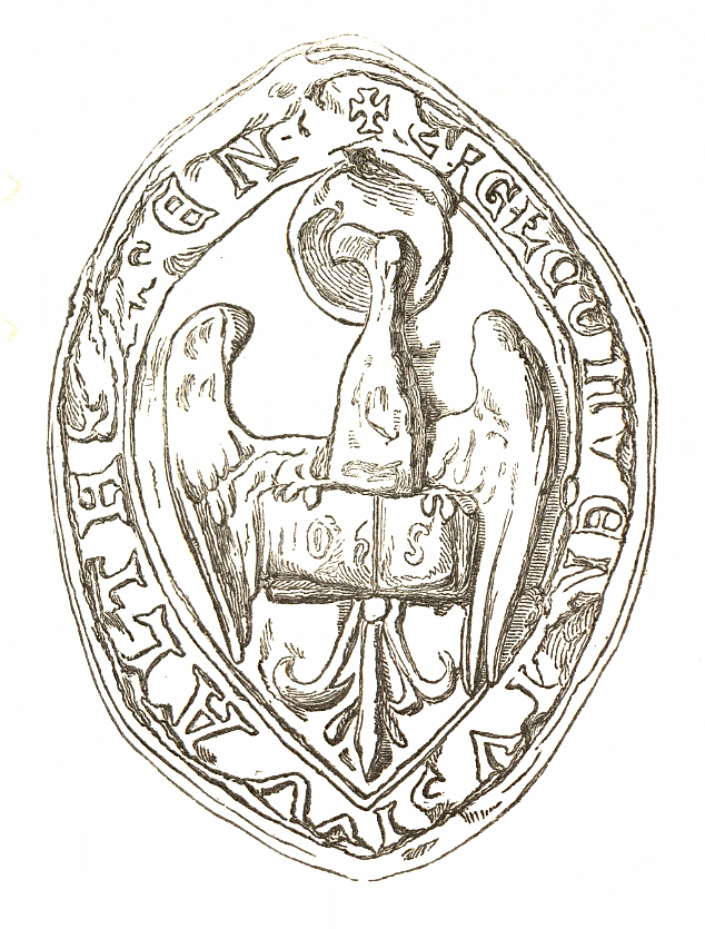 Zeichnung aus dem Jahrbuch der kaiserl. königl. Central-Commission zur Erforschung und Erhaltung der Baudenkmale III. 1859. Aufsatz von Karl von Sava, Sphragistiker, mit dem Titel: Die mittelalterlichen Siegel der Abteien und Regularstifte im Erzherzhogtum Österreich ob und unter der Enns Zuordnung der Zeichnungen entsprechend den Dateinamen